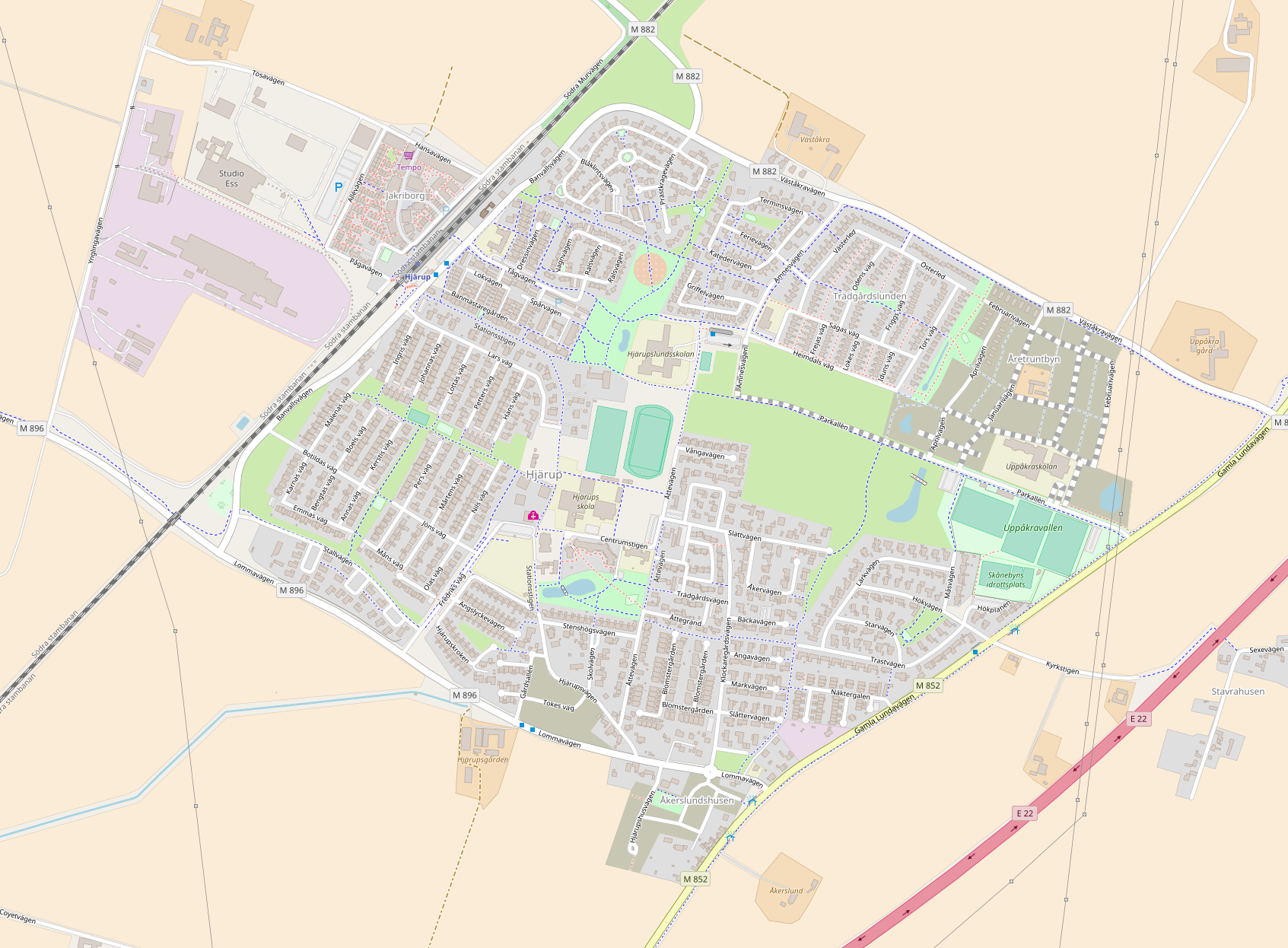 Map of Hjärup, Sweden